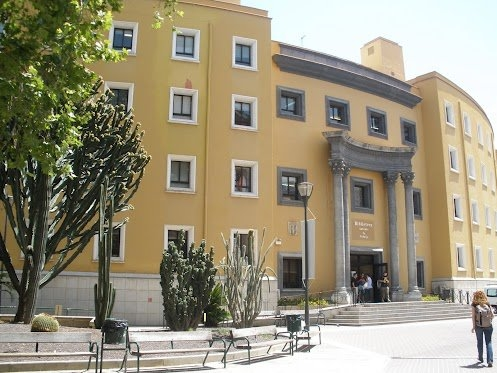 Fachada principal de la Biblioteca Antonio de Nebrija